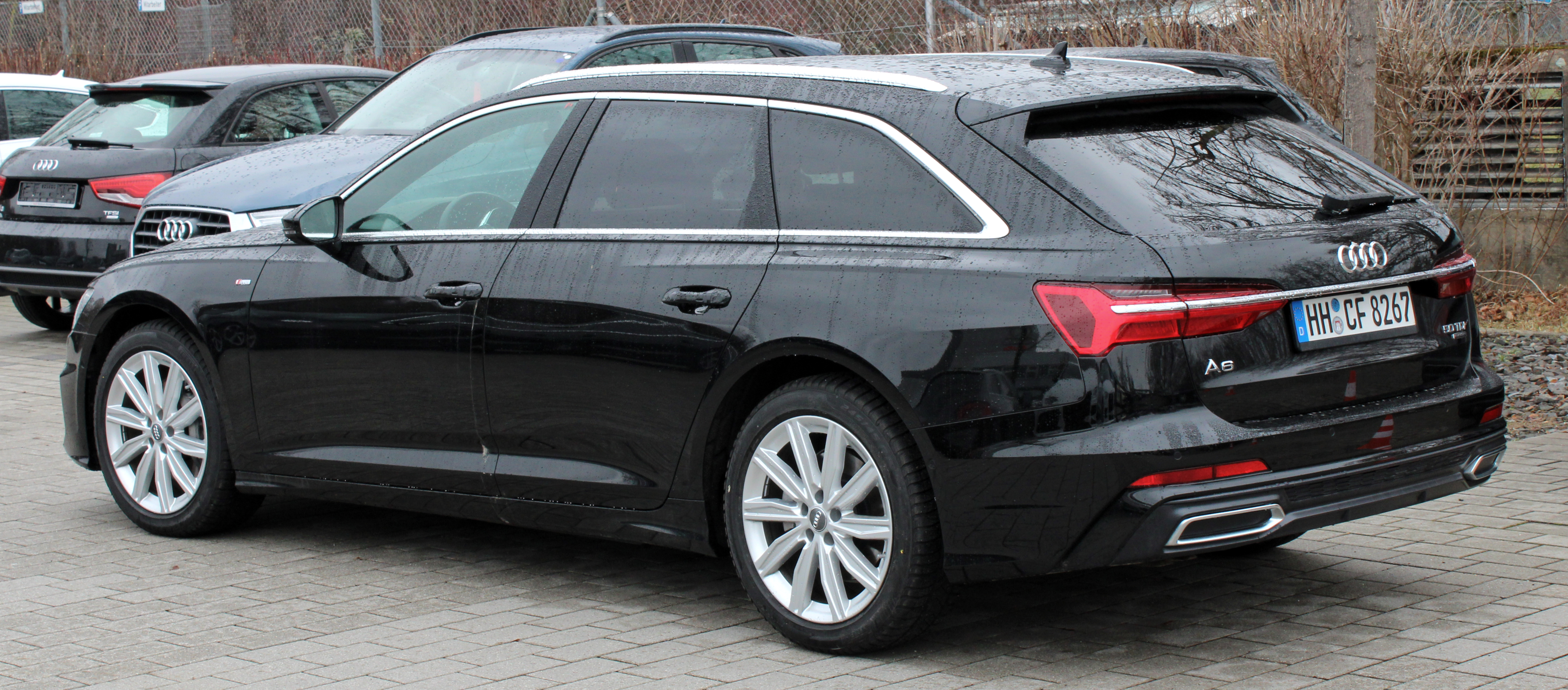 Audi A6 C8 Avant 50 TDI Quattro in Stuttgart-Vaihingen